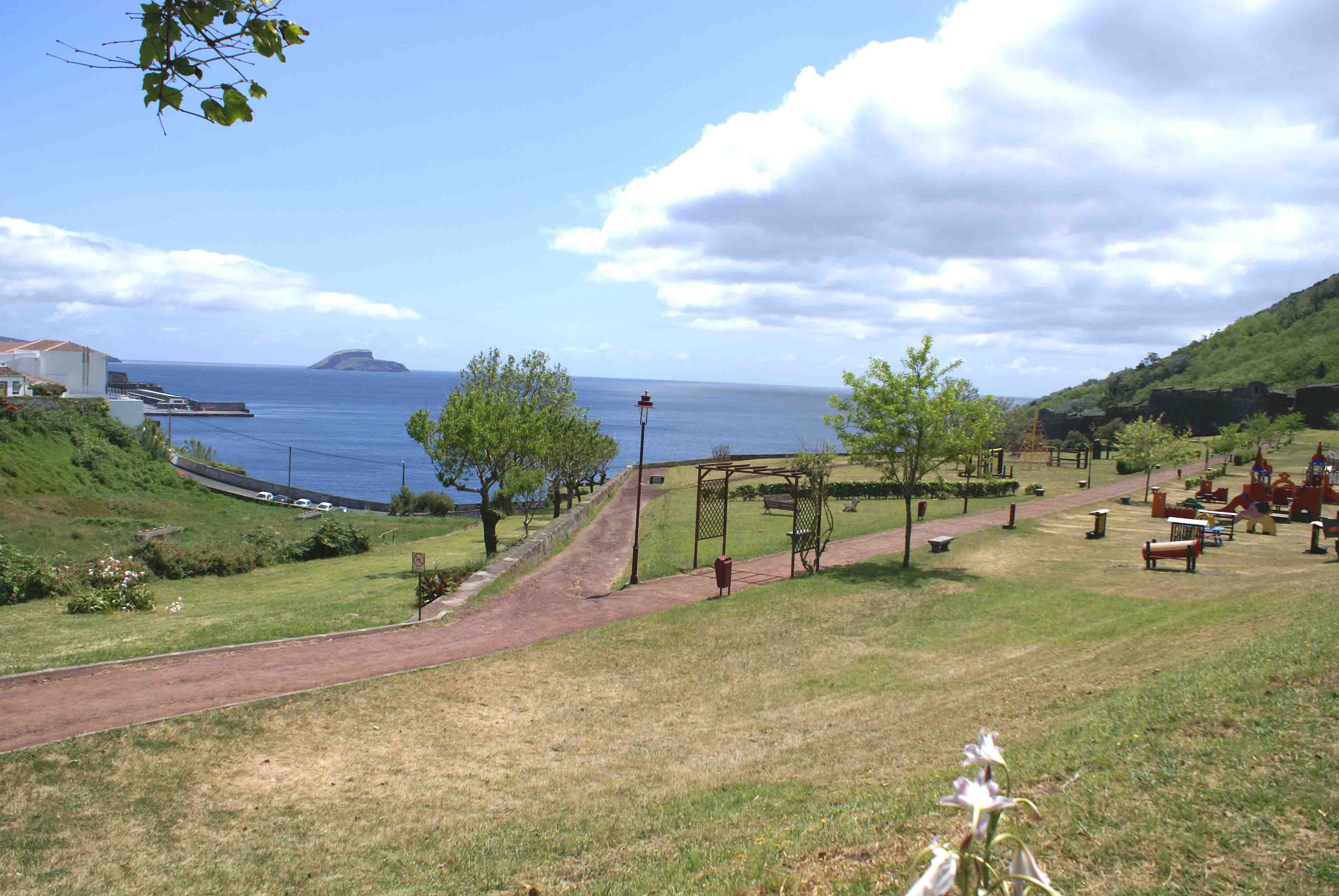 Parque do Relvão, Angra do Heroísmo, ilha Terceira, Açores, Portugal.